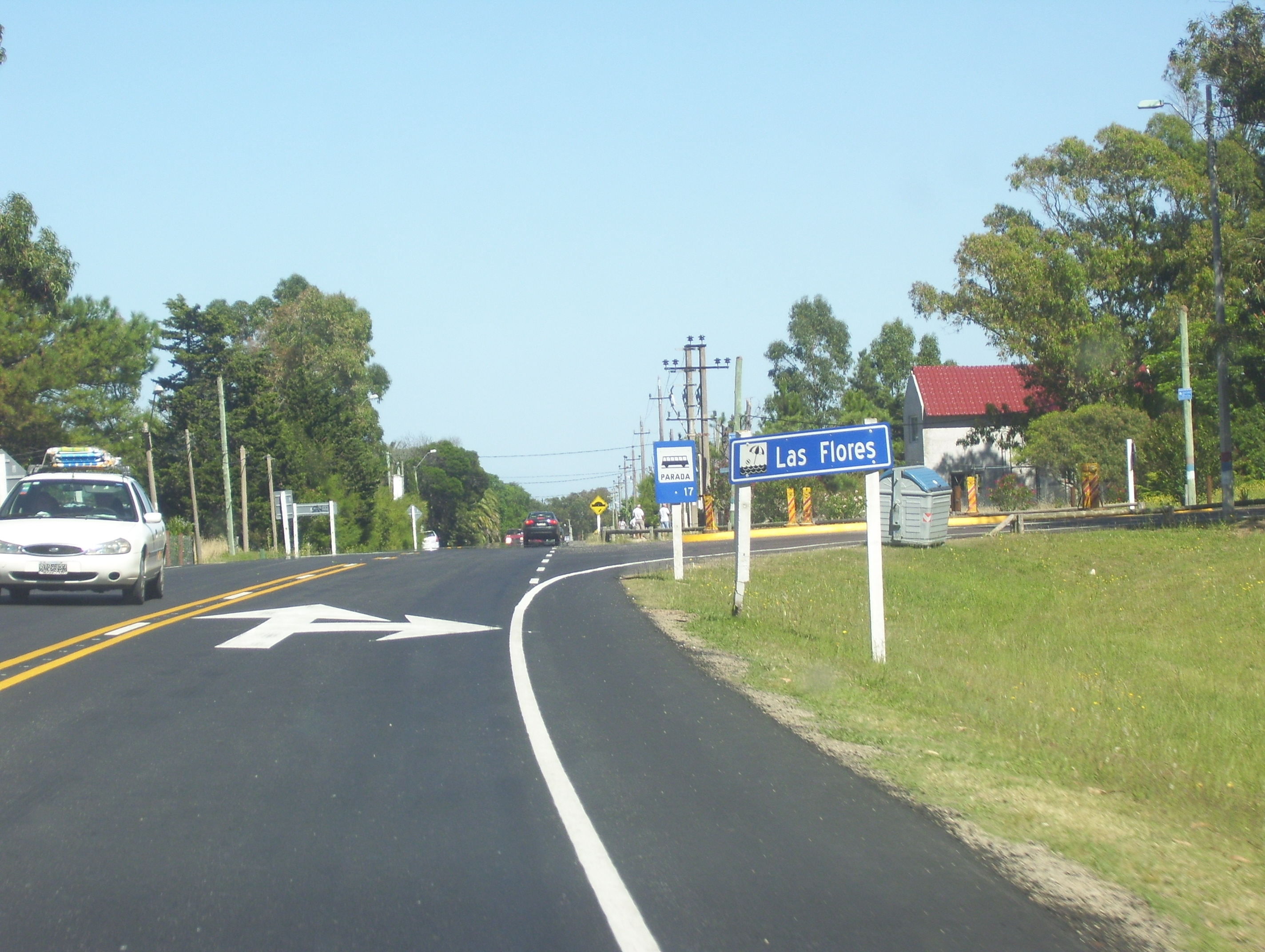 Balneario Las Flores desde la Ruta 10